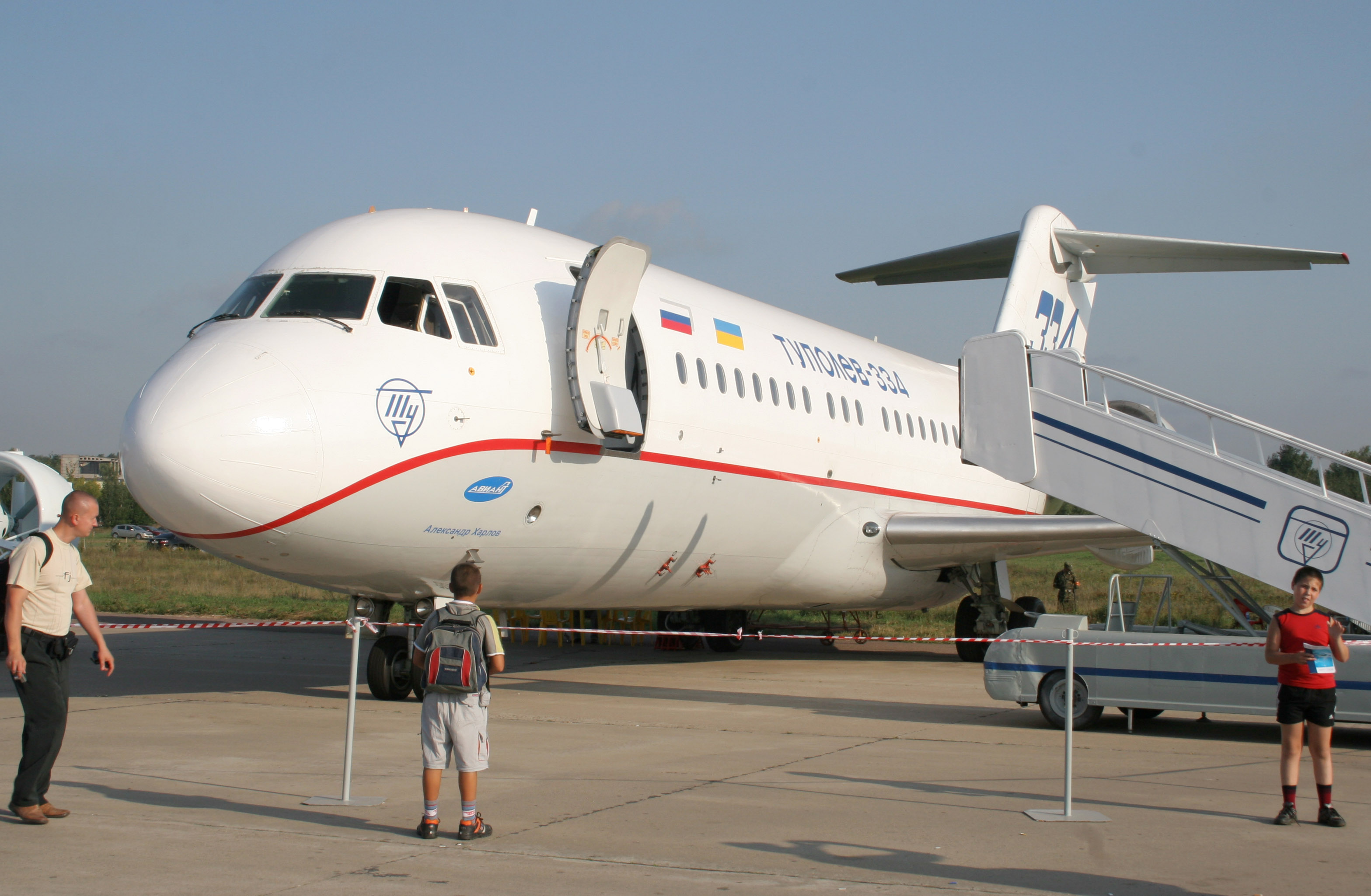 Самолёт Ту 334. Экспозиция МАКС-2007